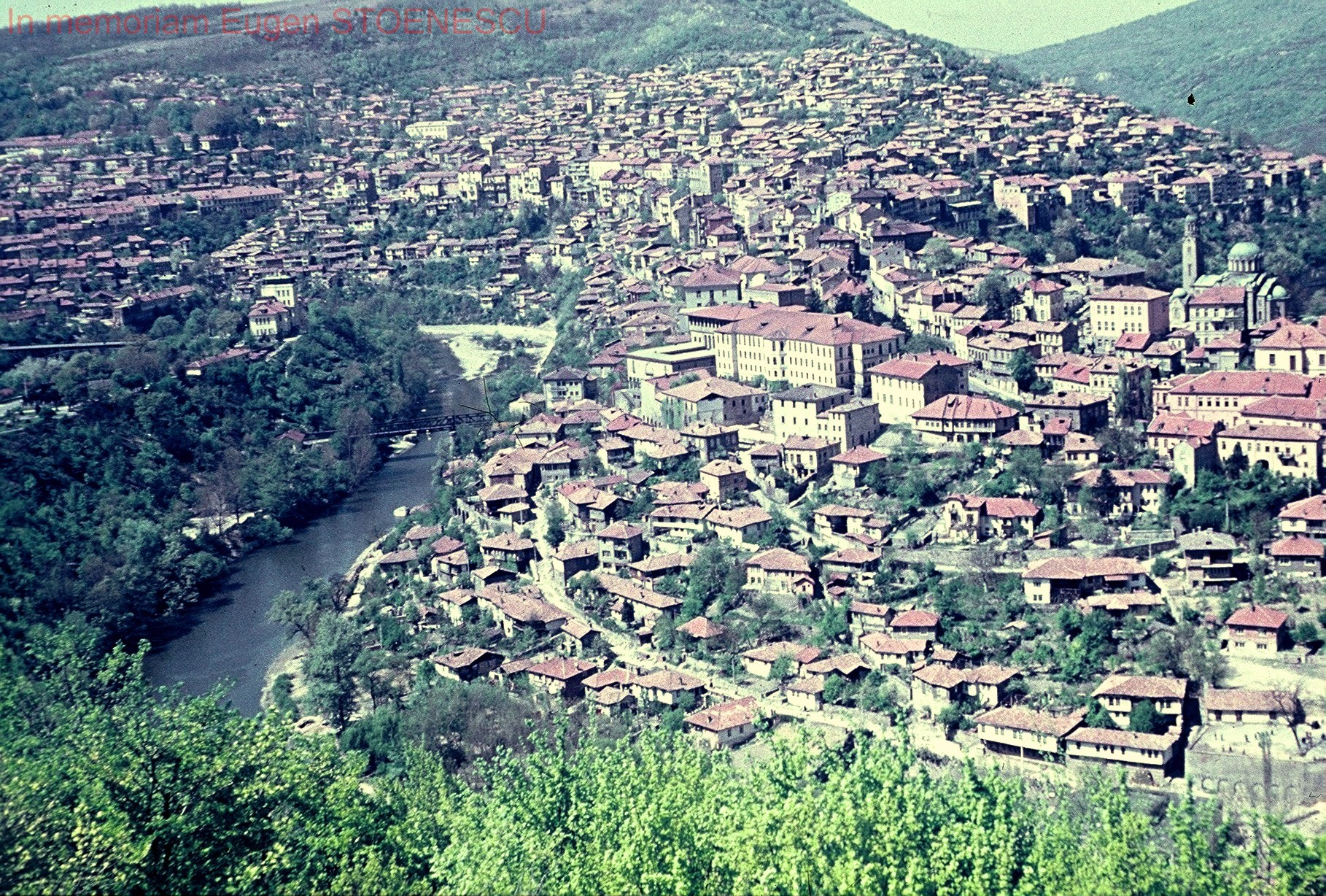 Panorama